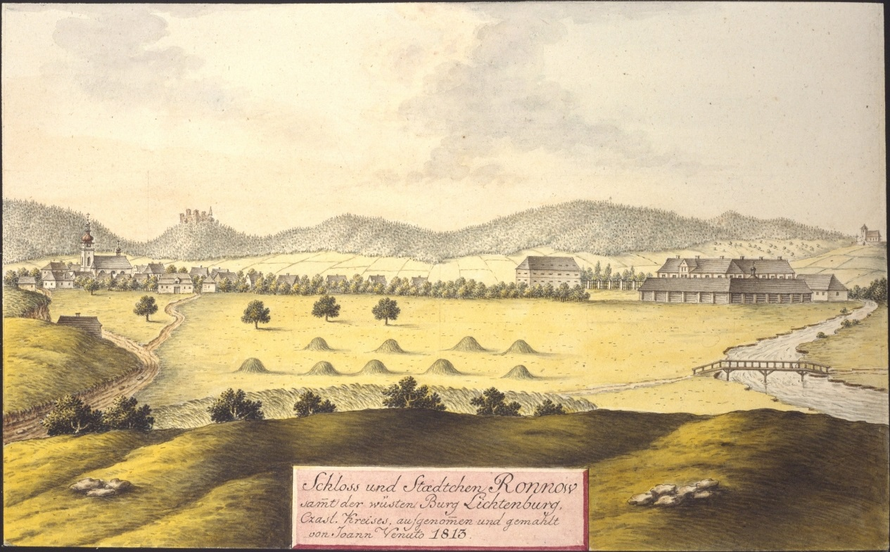 Zámek a městečko Ronov nad Doubravnou spolu s pustým hradem Lichnice. Schloss und Staedtchen Ronnow samt der wüsten Burg Lichtenburg, Czasl. Kreises, aufgenommen und gemahlt von Joann Venuto 1813